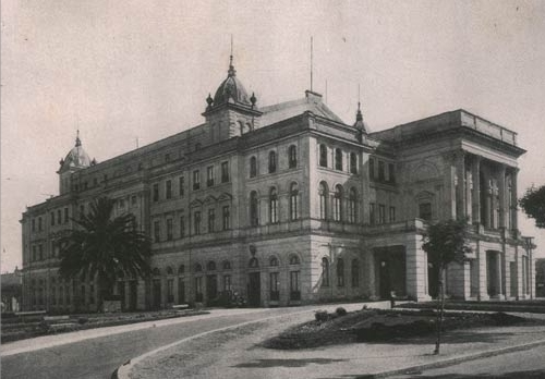 Es el antiguo Teatro Argentino de La plata, el cual se incendió y fue demolido.